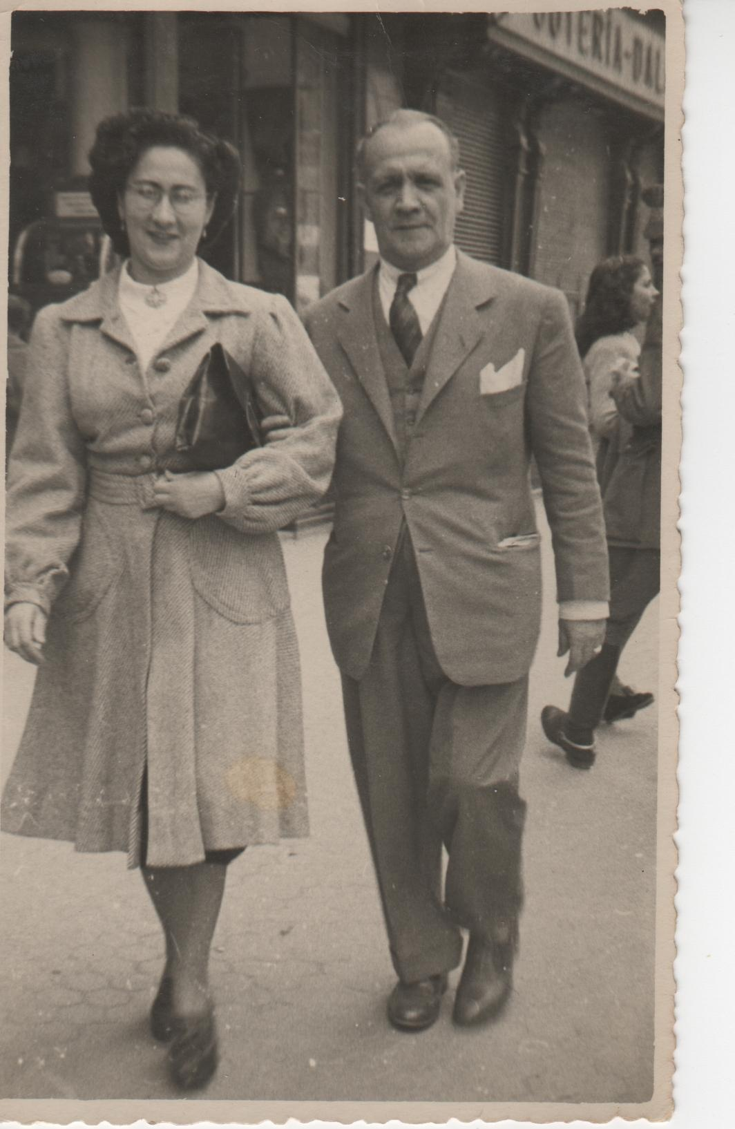 José Torné Jiménez dando un paseo con su hija por Santander.